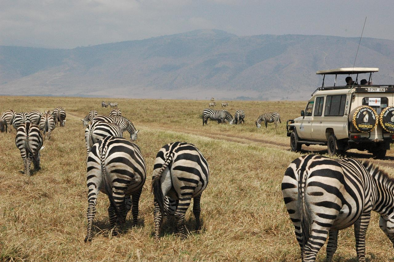 ספארי בנגורונגורו שבצפון טנזניה.